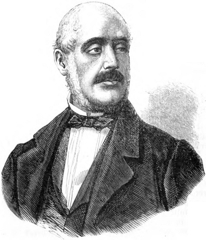 Ritratto di Giuseppe Ferrari